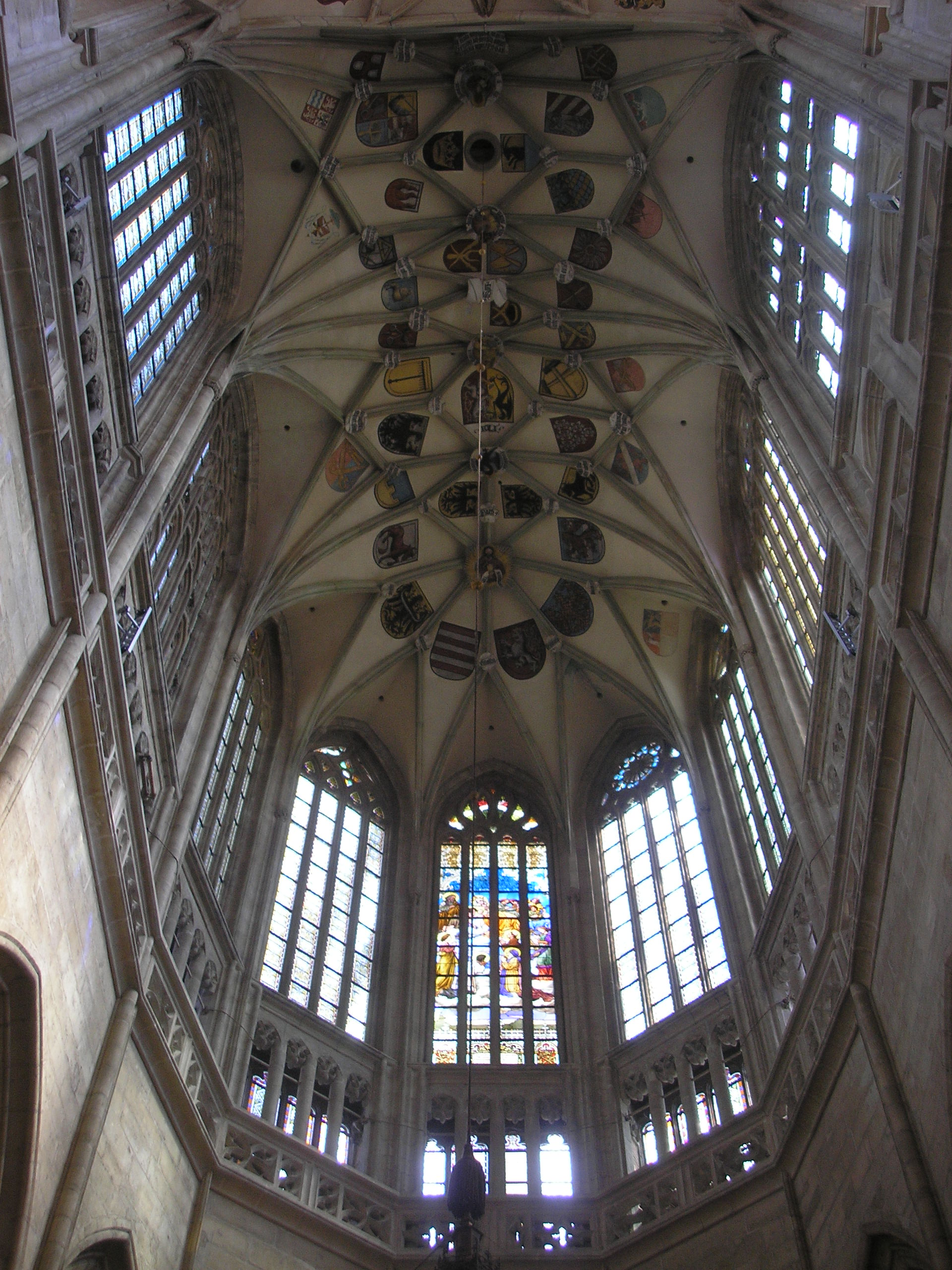 Gewölbe des Doms der heiligen Barbara in Kuttenberg